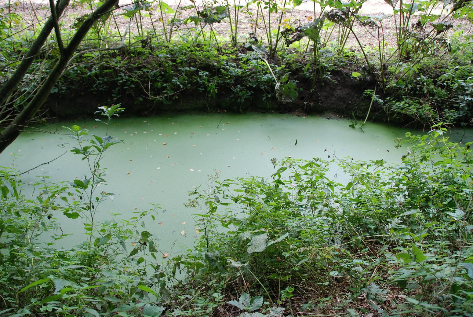 Limburgs: 'ne pool in Baek